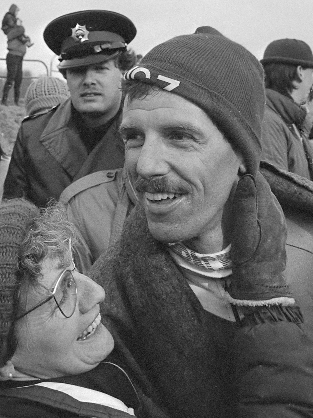 Winnaar van Noorderrondrit Albert Bakker. Albert Bakker wordt gefeliciteerd door zijn moeder 18 februari 1986